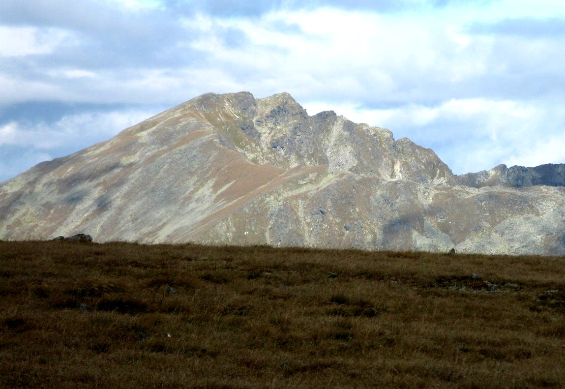 Geierhaupt